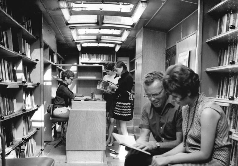 Dresden, Bibliothekswagen, Innenansicht Zentralbild Häßler 4.9.70-kat-Dresden: Bibliothek auf Rädern- Gut beraten vom Leiter der Einrichtung, Harry Töpfer, wird die Schülerin Ute Ottemann, eine der 7 500 ständigen Leser im Stadtgebiet Dresden, die jährlich durch diese rollende Bücherei literarisch betreut werden. Seit einem Jahr sind zwei neue Fahrzeuge der Stadt- und Bezirksbibliothek Dresden im Einsatz. Jeweils 5.000 Bücher kann ein Fahrzeug zu einem Standort mitnehmen. 30.000 Bände stehen den Lesern der Bücherei insgesamt zur Verfügung. (bitte beachten Sie dazu Foto J 0904-23-1N)